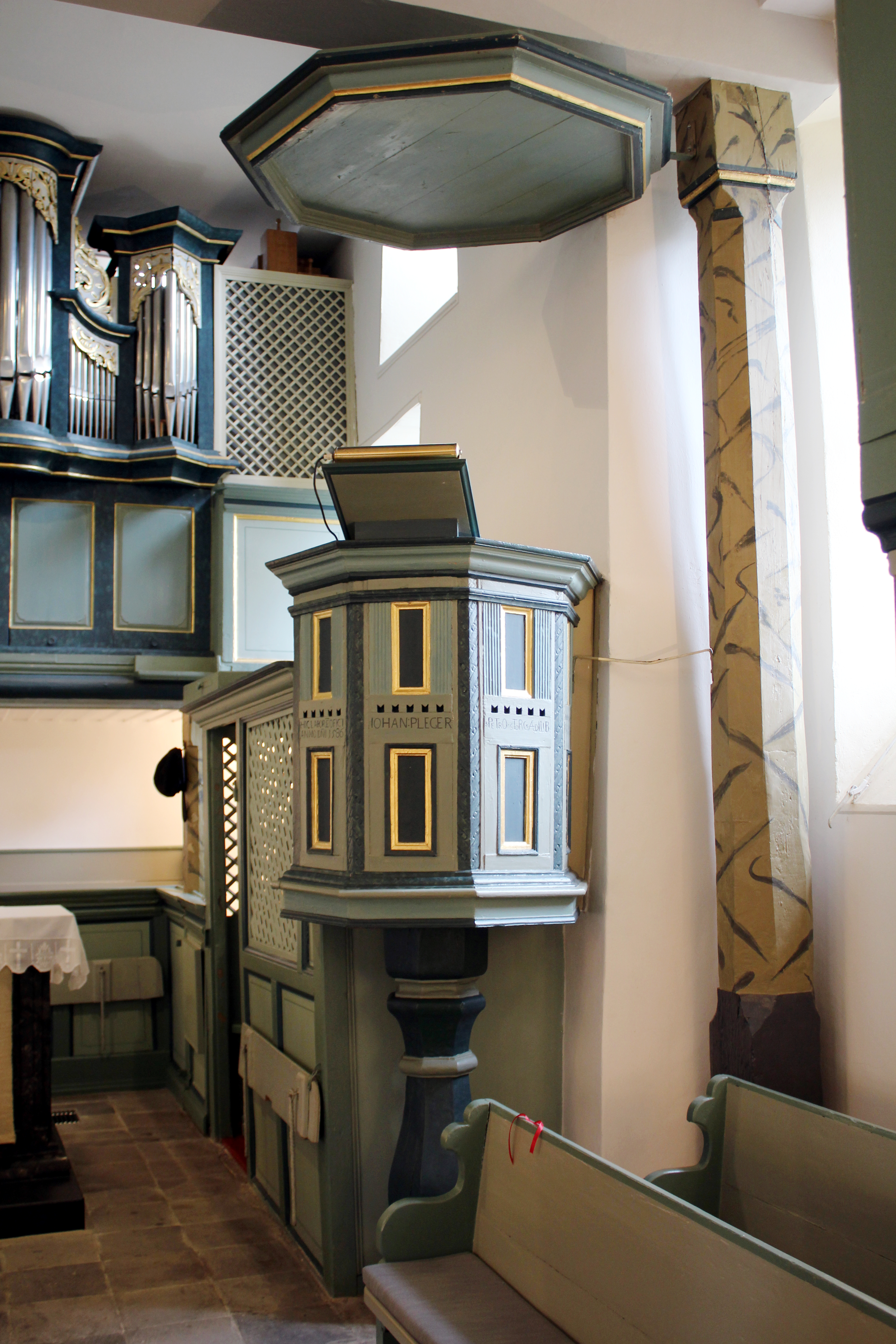 Ev. Kirche Laufdorf, Lahn-Dill-Kreis, Hessen, Deutschland